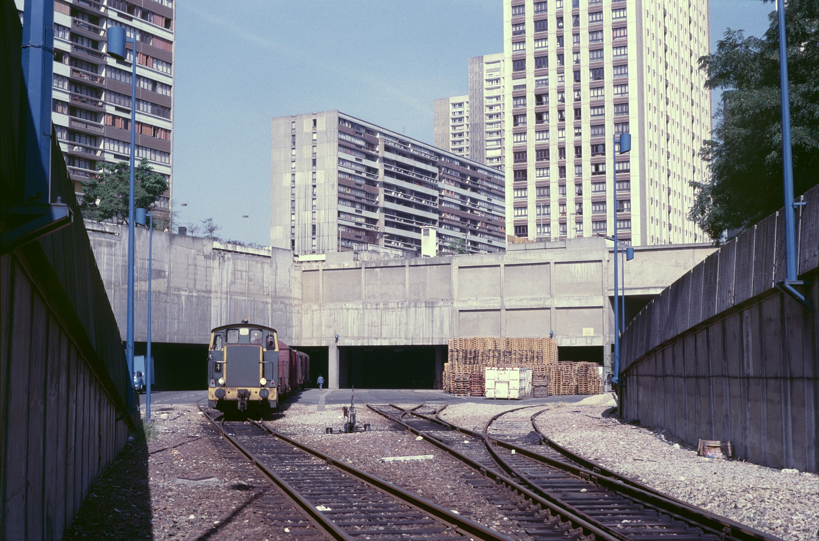 Un train de desserte marchandises en gare de Paris-Gobelins, sur la Petite Ceinture de Paris le 9 août 1985.